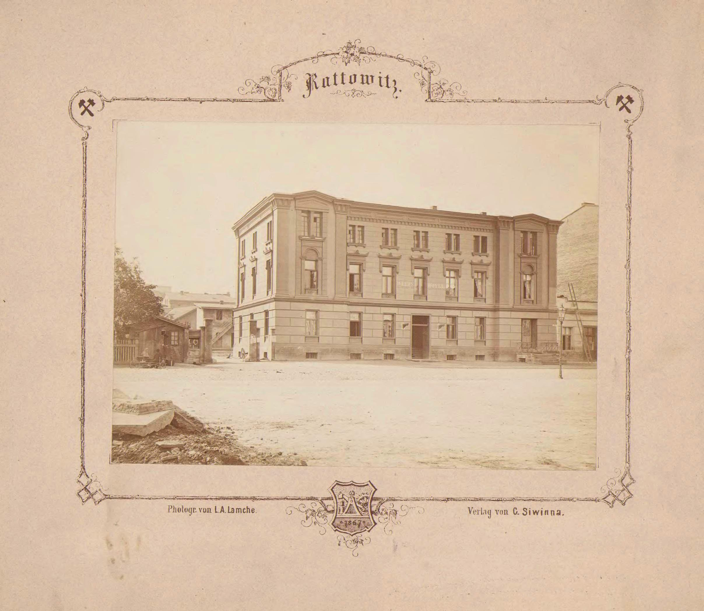 Katowice. Dzisiejsza ul. Warszawska, budynek hotelu "Welt" (w pobliżu Rynku)